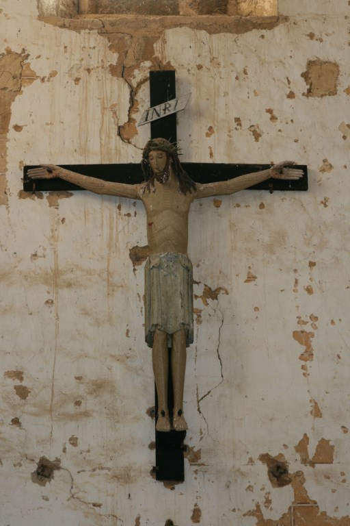 Christ de Varenne l'Arconce - Bois polychromé 12ème siècle